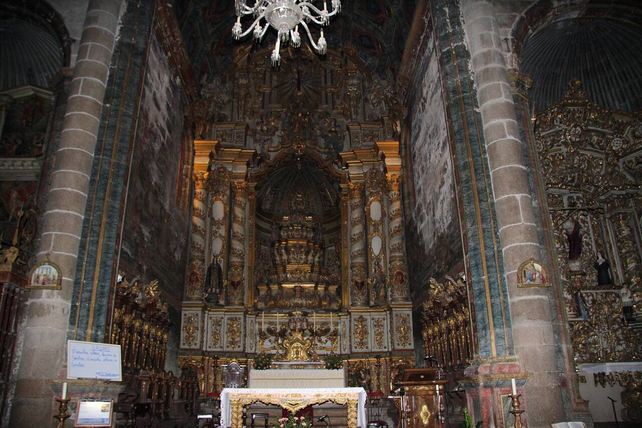 Altar Mor a partir da nave central